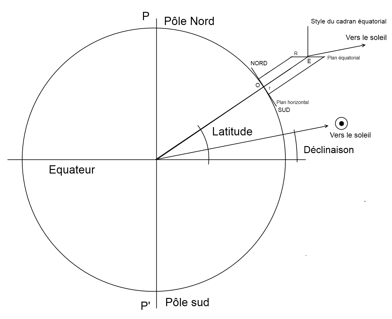 Ce schéma indique le principe de construction du cadran analemmatique par projection du cadran équatorial sur un plan (ici horizontal avec projection verticale).